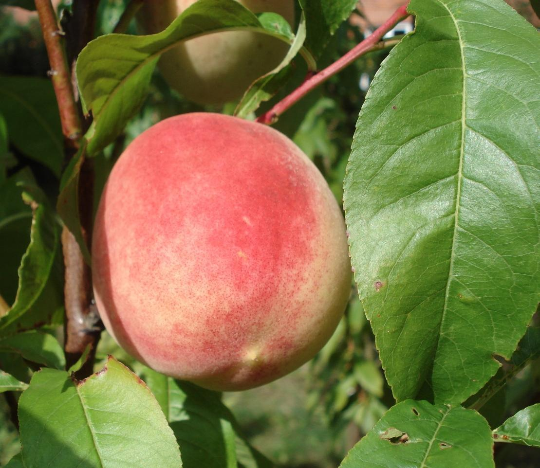 Pfirsich "Roter Ellerstaedter"